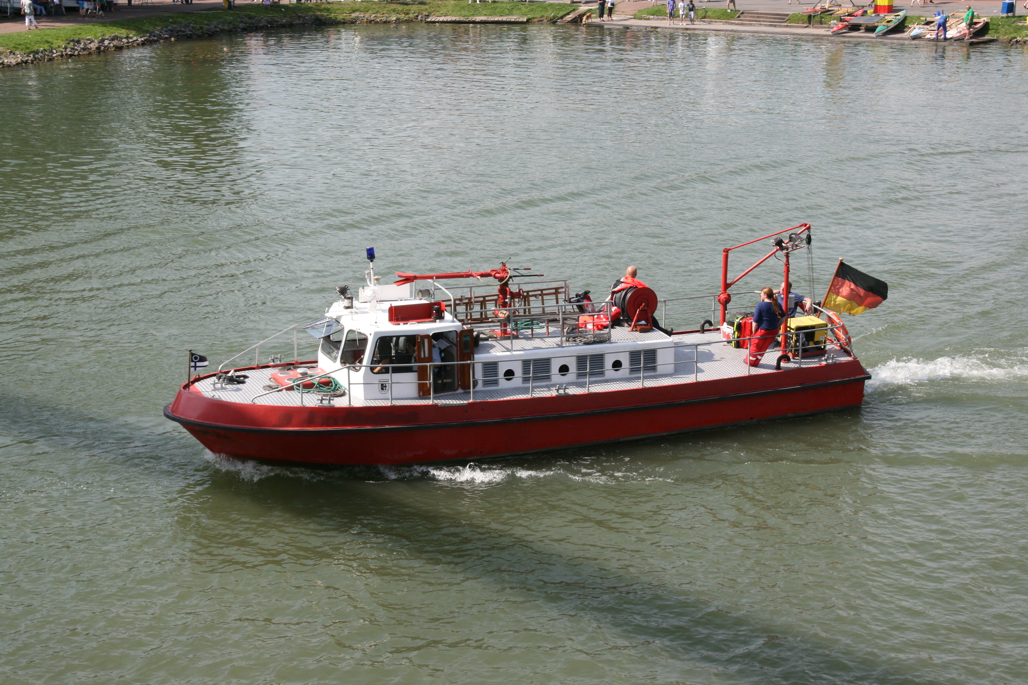 Feuerlöschboot Datteln (Bj. 1963), fotografiert von der Hafenbrücke am Hafen/Dortmund-Ems-Kanal beim Kanalfestival 2011 in Datteln